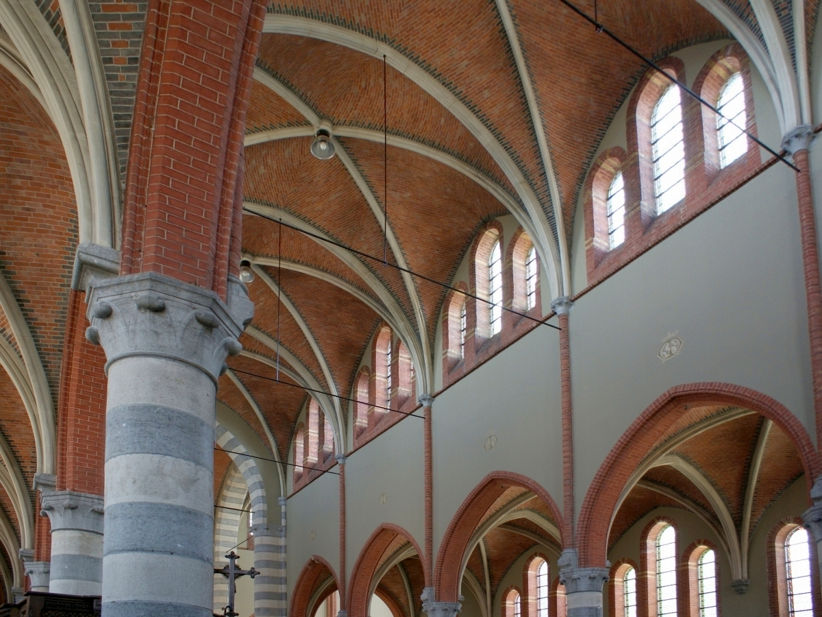 Pilaren met bladkapitelen. Gewelf in rode steen met randen in zwarte steen.